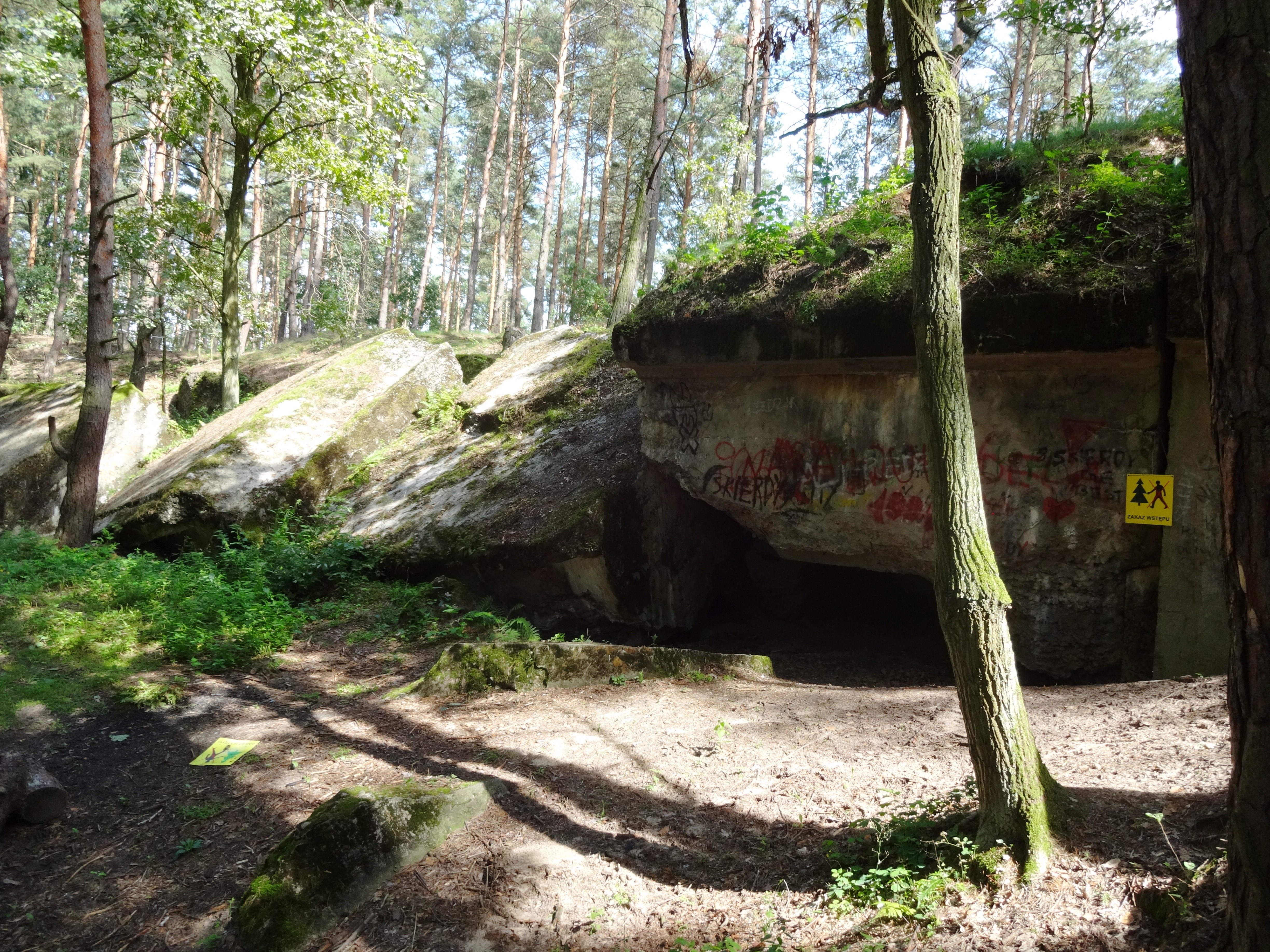 Dzieło D-10 Fort XVIIIa Twierdzy Modlin w Janówku Drugim